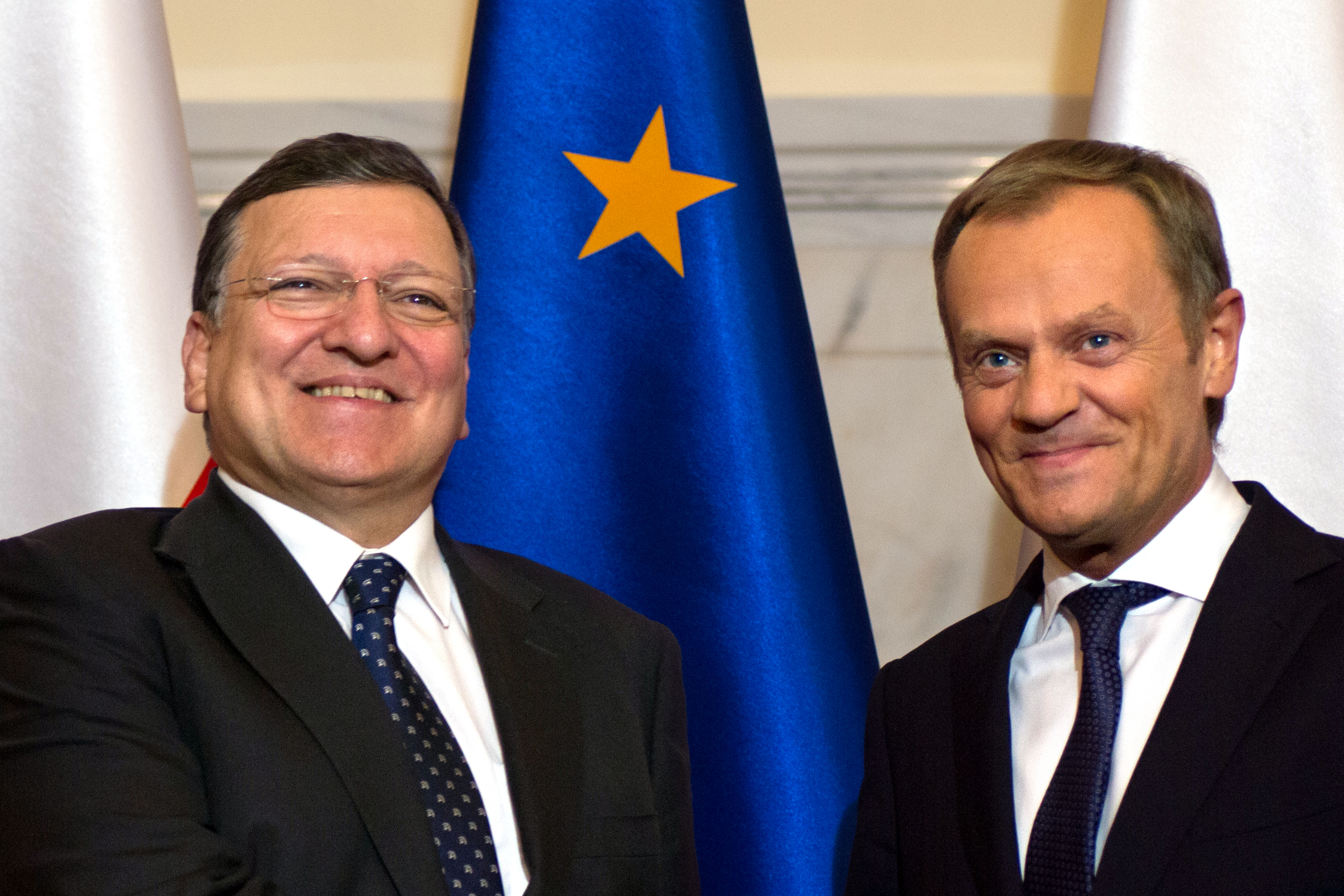 Spotkanie premiera Donalda Tuska z szefem Komisji Europejskiej Jose Manuelem Barroso - Warszawa, Gmach Kancelarii Prezesa Rady Ministrów, Sala Obrazowa, 09.05.2014, ok. godziny 20:30